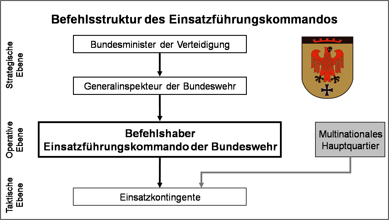 Befehlsstruktur Einsatzführungskommando